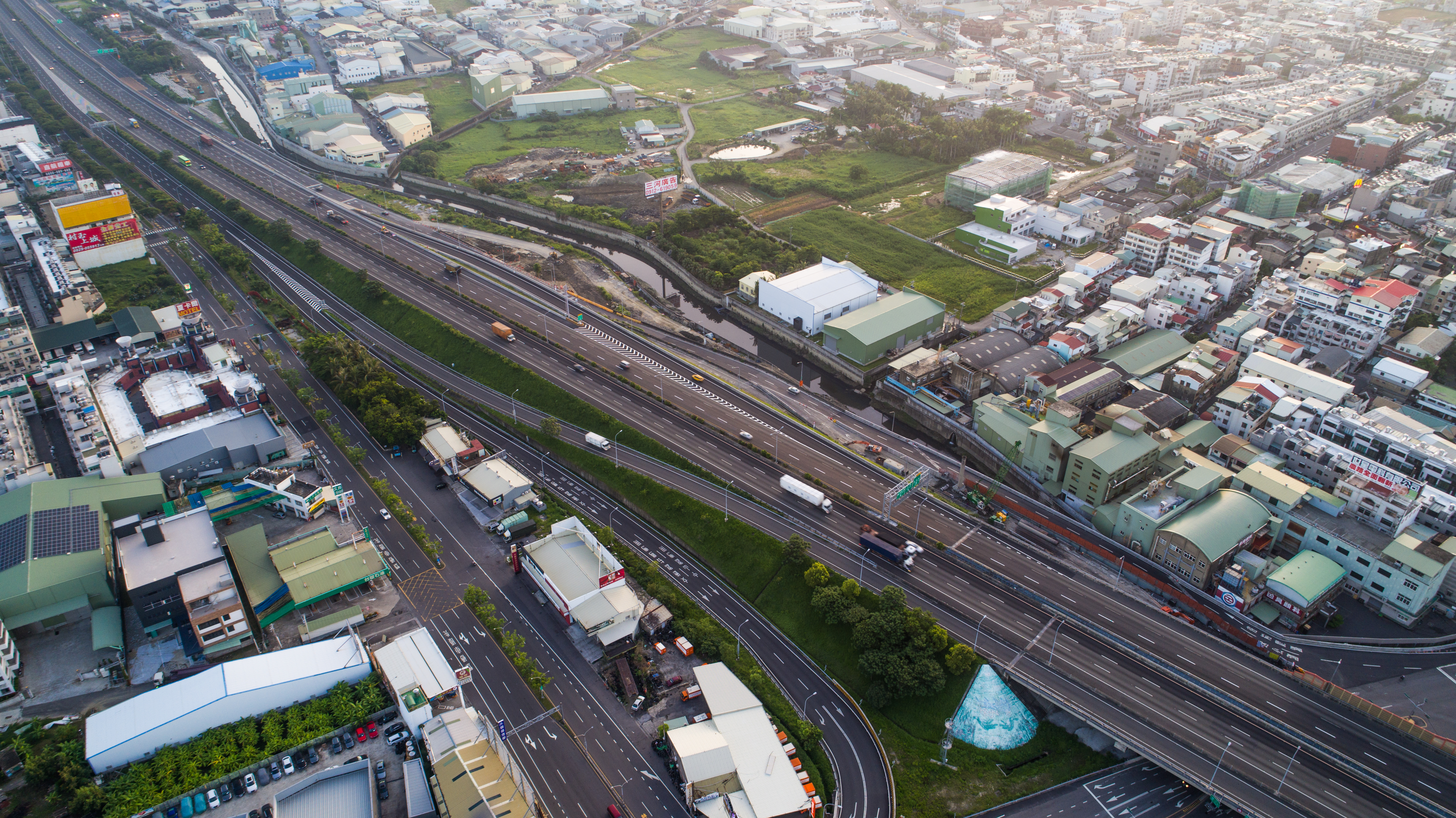 中文（台灣）: 仁德系統交流道